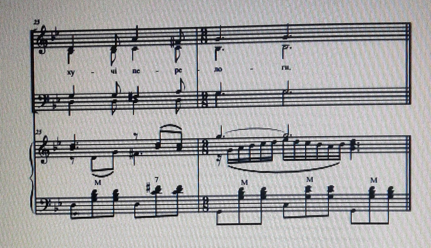 Ноти до "Пісні про хліб"